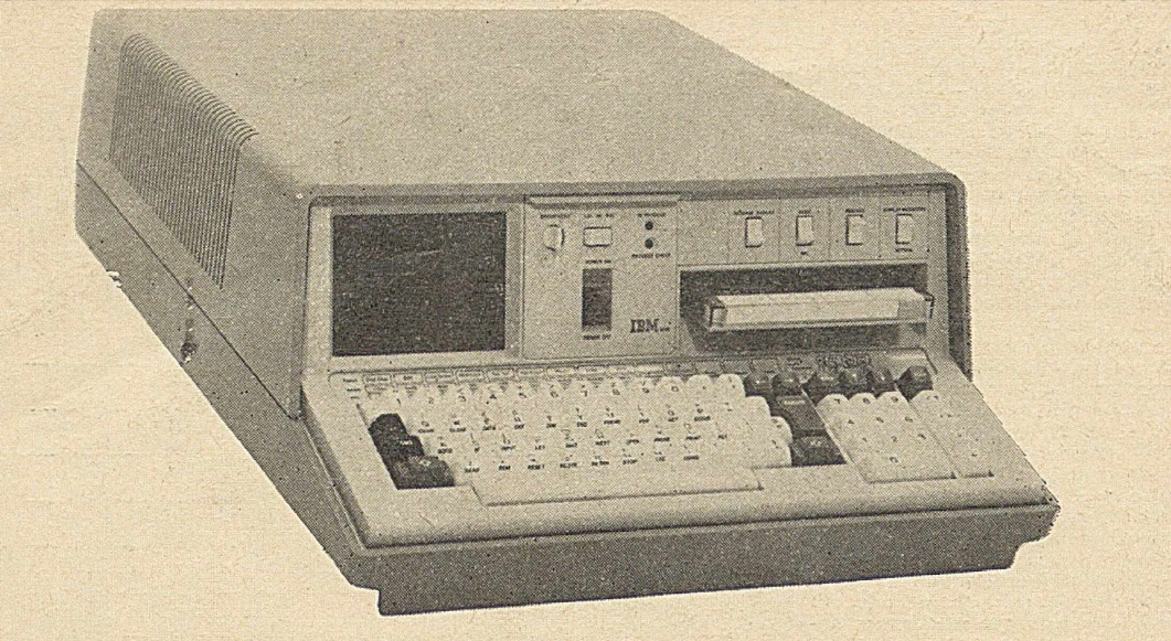 IBM 5100